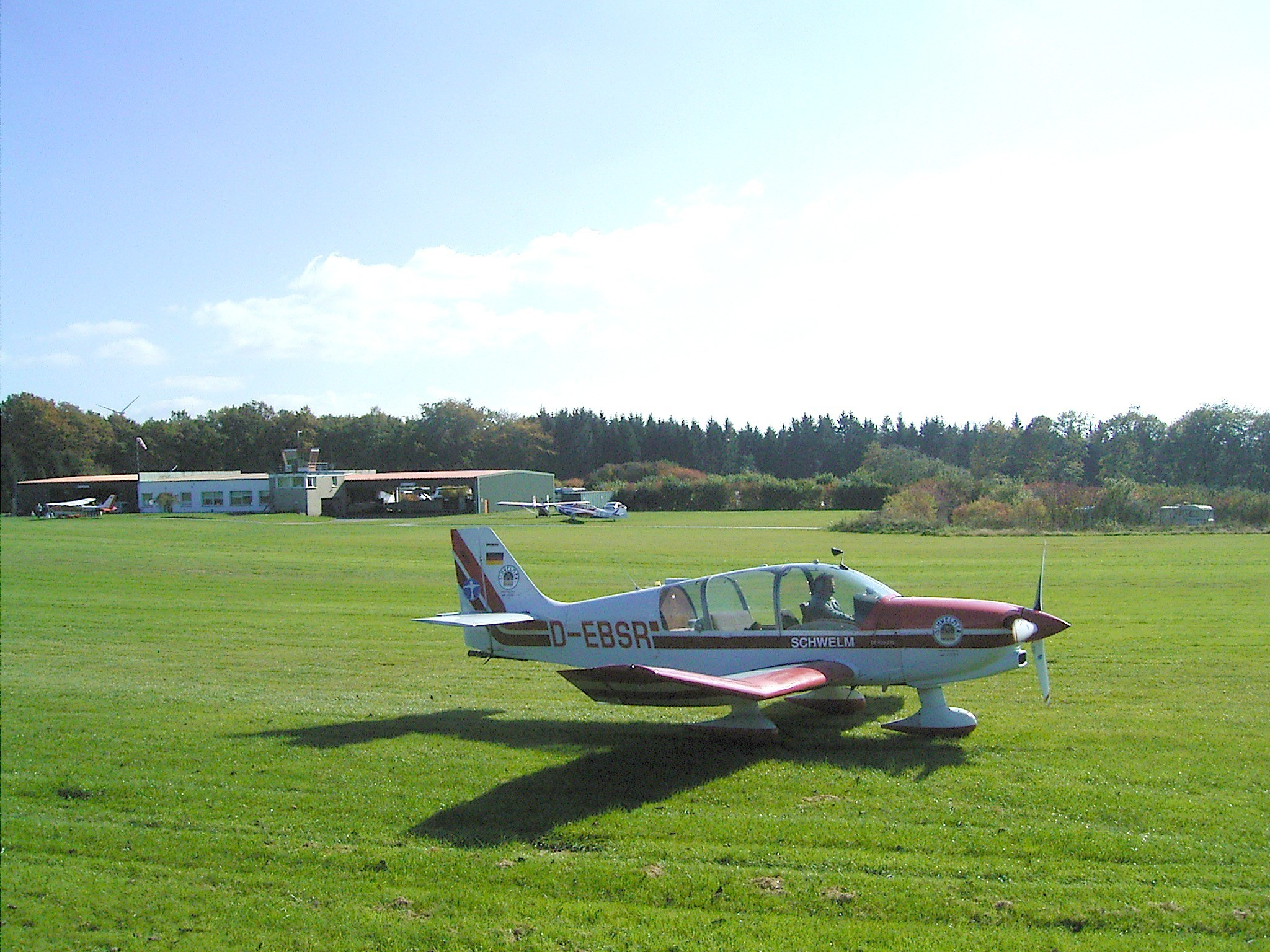 Radevormwald